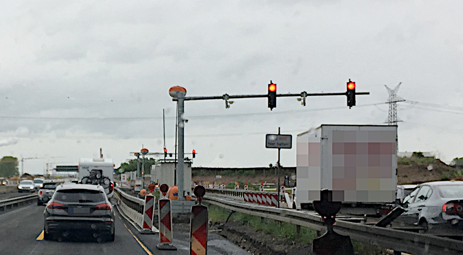 Rheinbrücke Leverkusen - Sperranlagen A1. Die Ampel der Zufahrt nordostwärts von der Industriestraße kommend ist auf Rot, da ein LKW die 3.5-Tonnen-Gewichtsbeschränkung ignoriert hat.